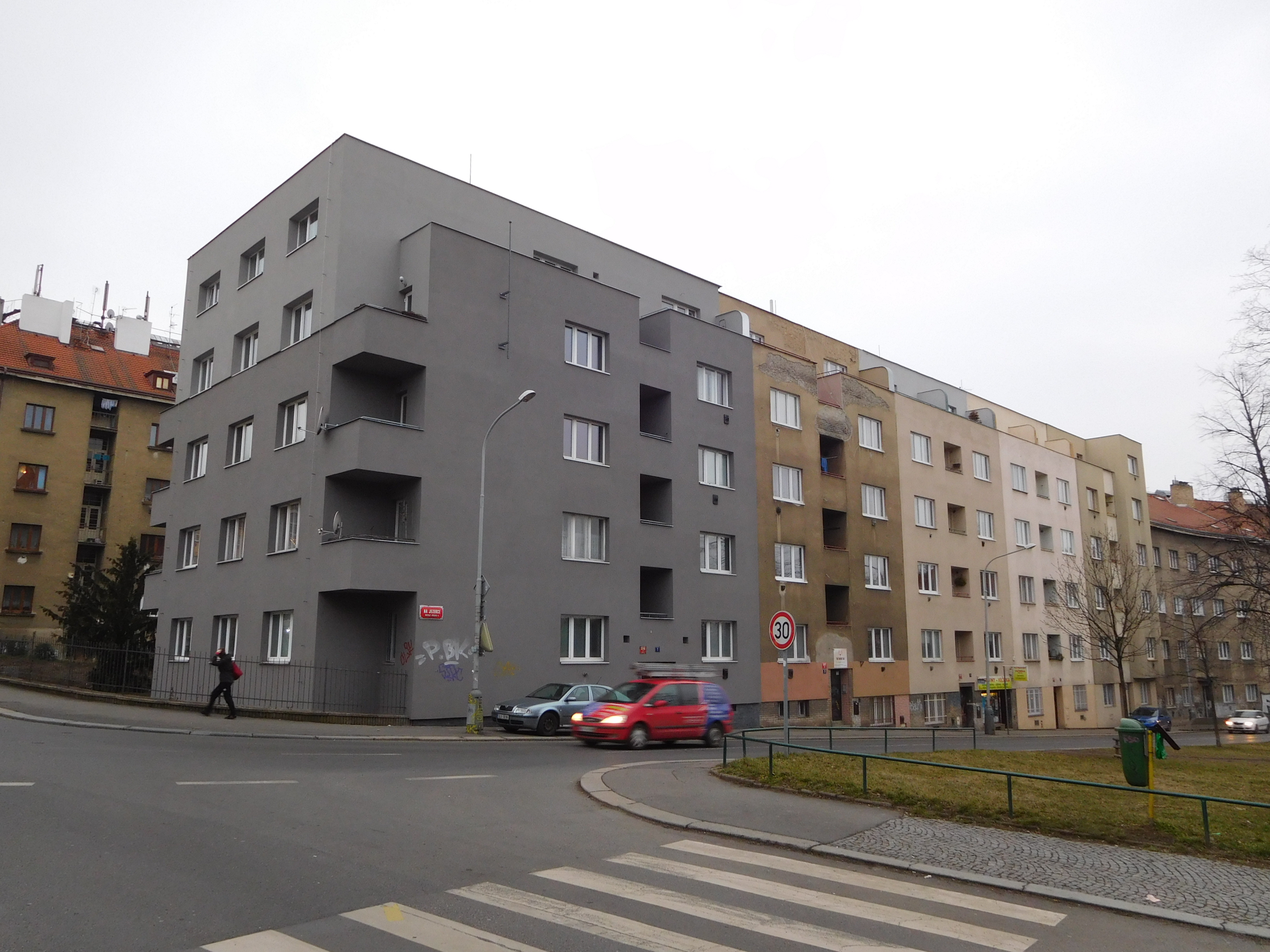 Praha - Na Jezerce 1-9 (arch. Josef Kučera, K. Hannauer, M. Tryzna, 1935)